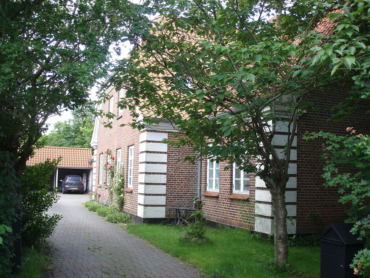 Hjallerup Station